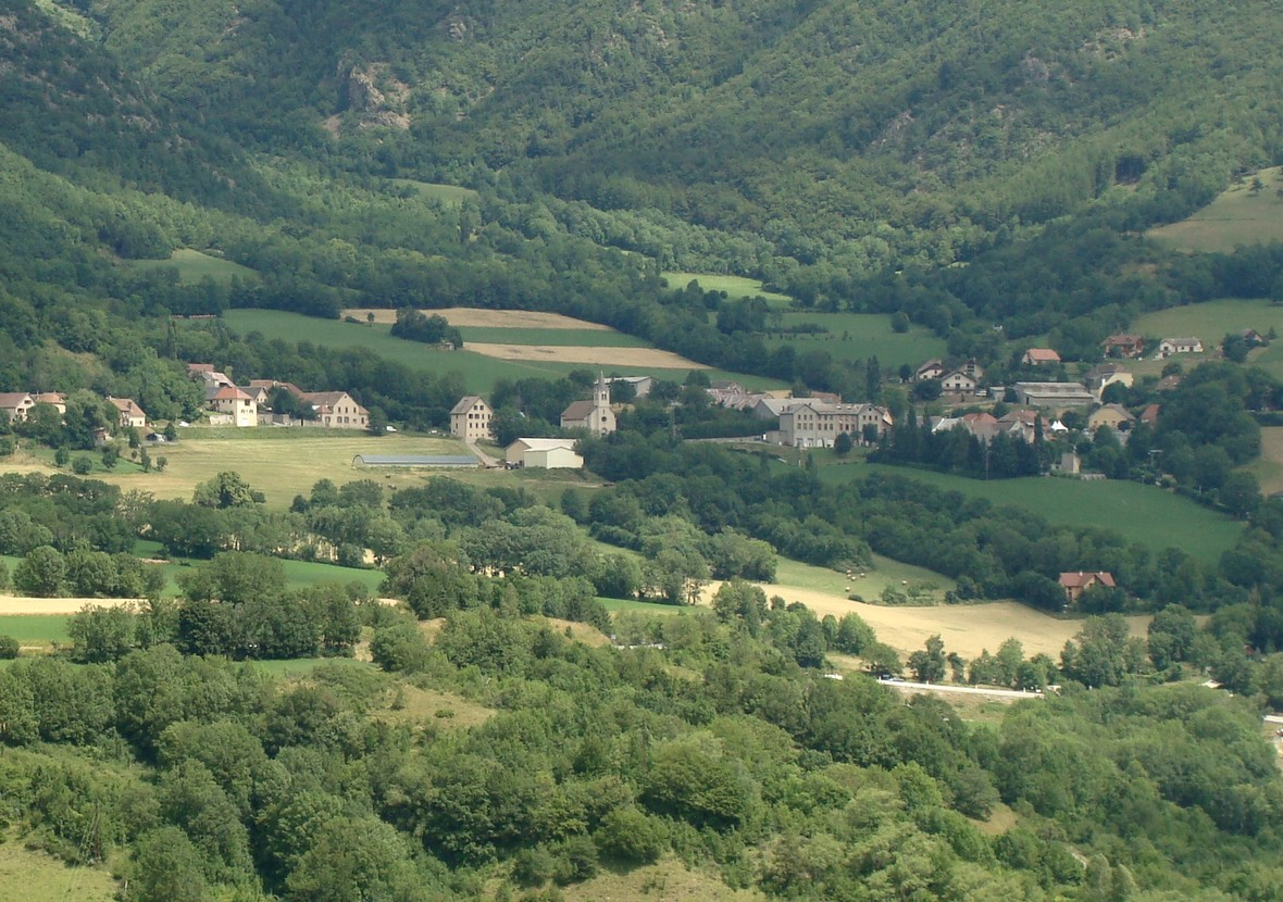 Aspres-lès-Corps (Hautes-Alpes) vu de la route de Beaufin (Isère).